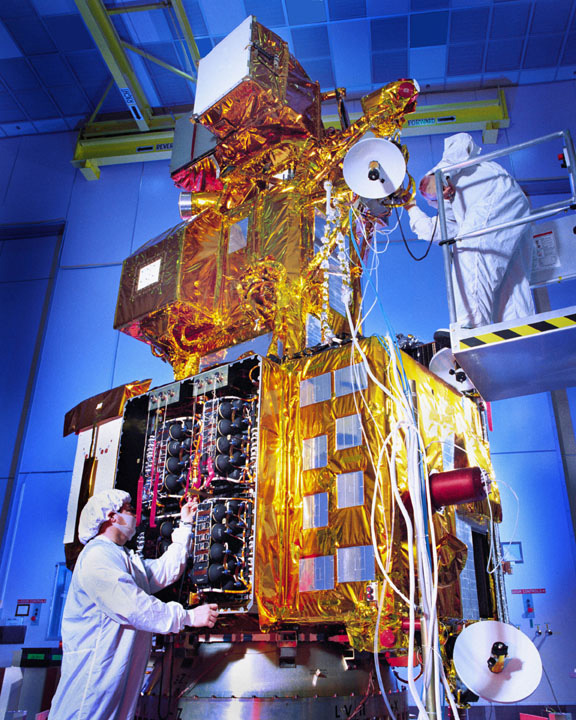 Landsat 7, pre-launch